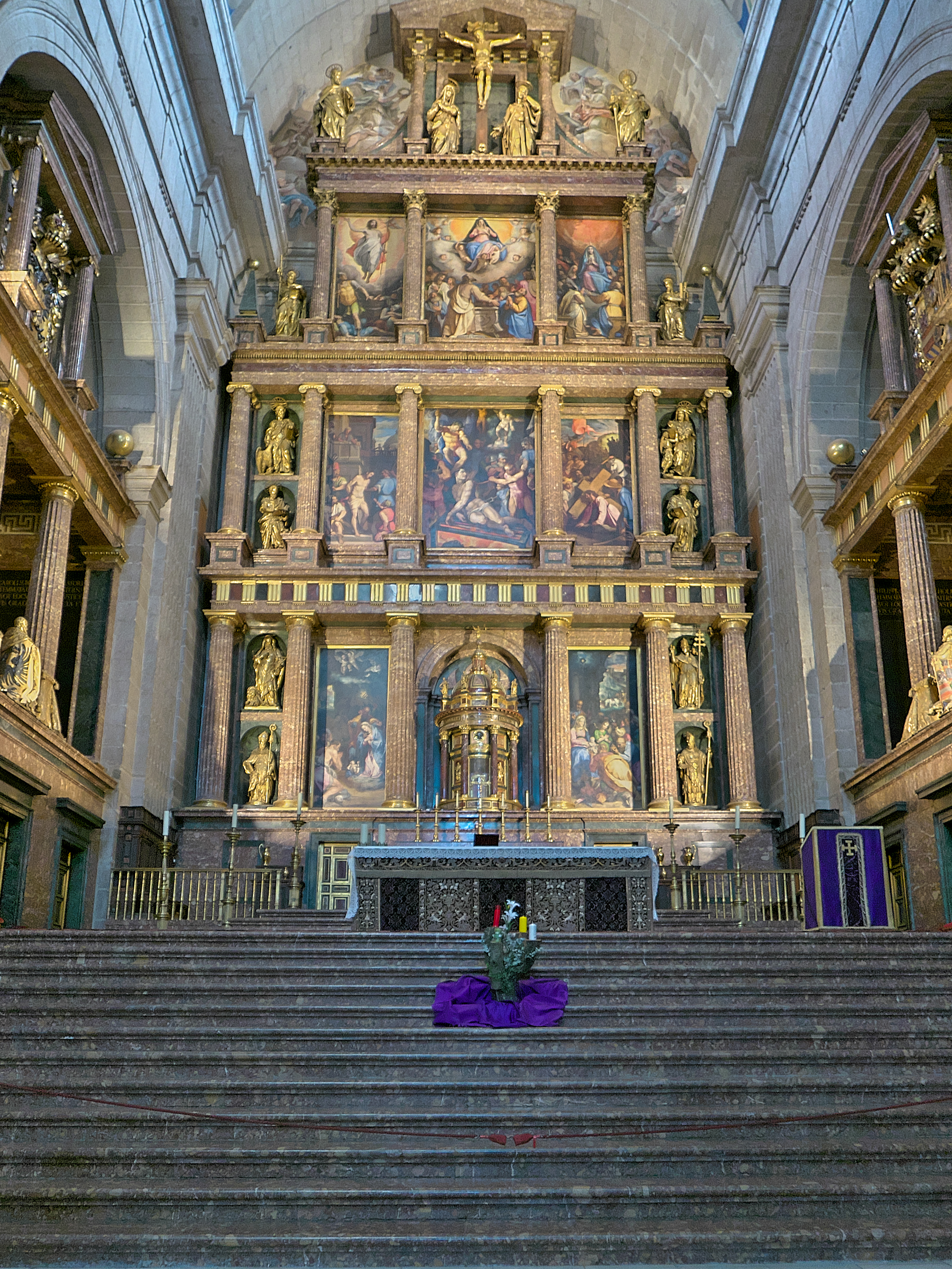 En el año 1579 se comienza el retablo mayor de la Basílica de El Escorial, según trazas de Juan de Herrera. Jacome da Trezzo dirige el proyecto, interviniendo, la escultura en bronce de Pompeo Leoni y el especialista en mármol y jaspe, Juan Bautista Comane que terminarían la magna obra en 1588, con la pintura de Federico Zúccaro y Pellegrino Tibaldi.